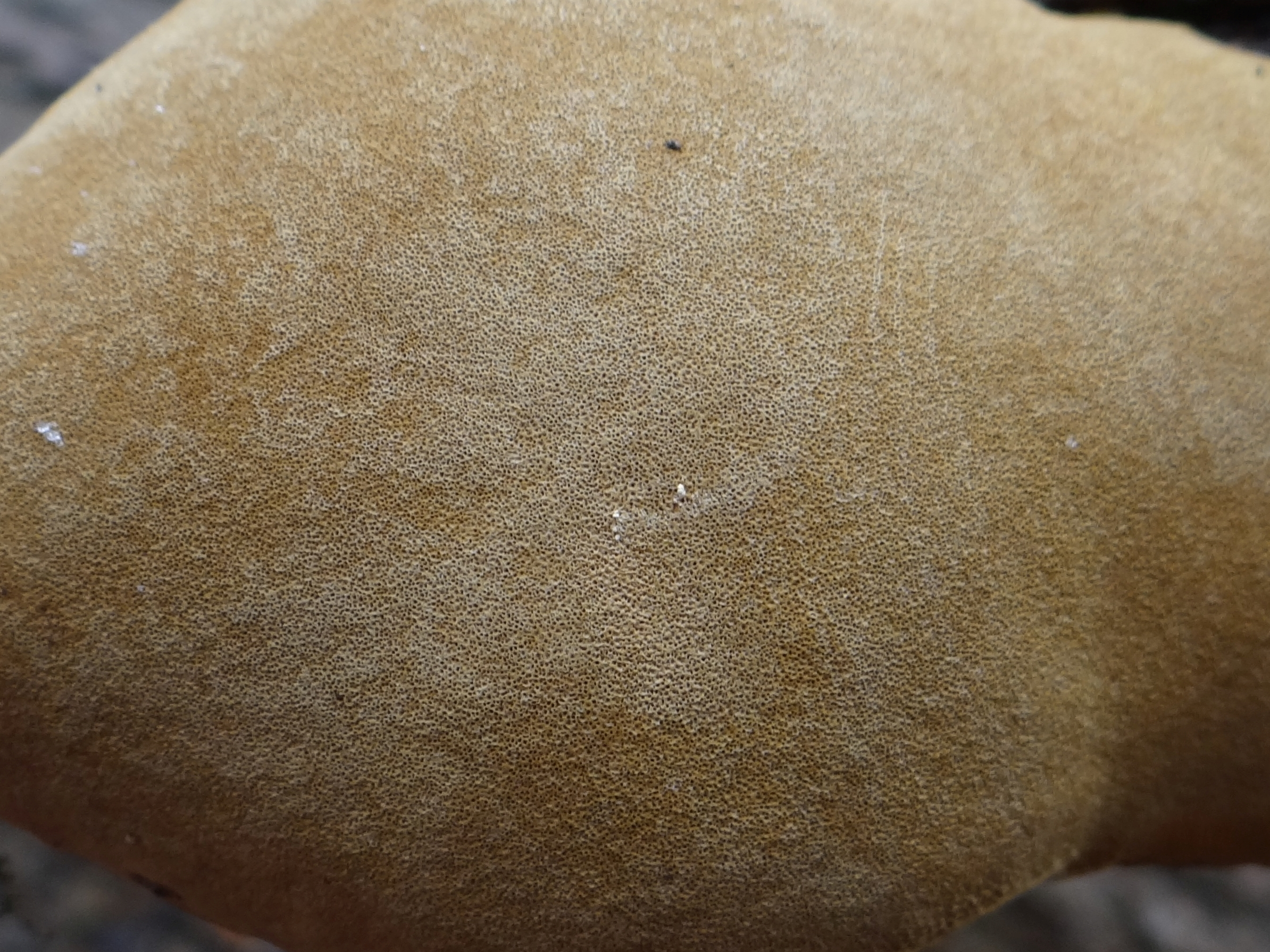 Fomitiporia punctata Location: Poland, Zelków